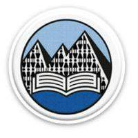 Logo des Instituto de Defesa Nacional